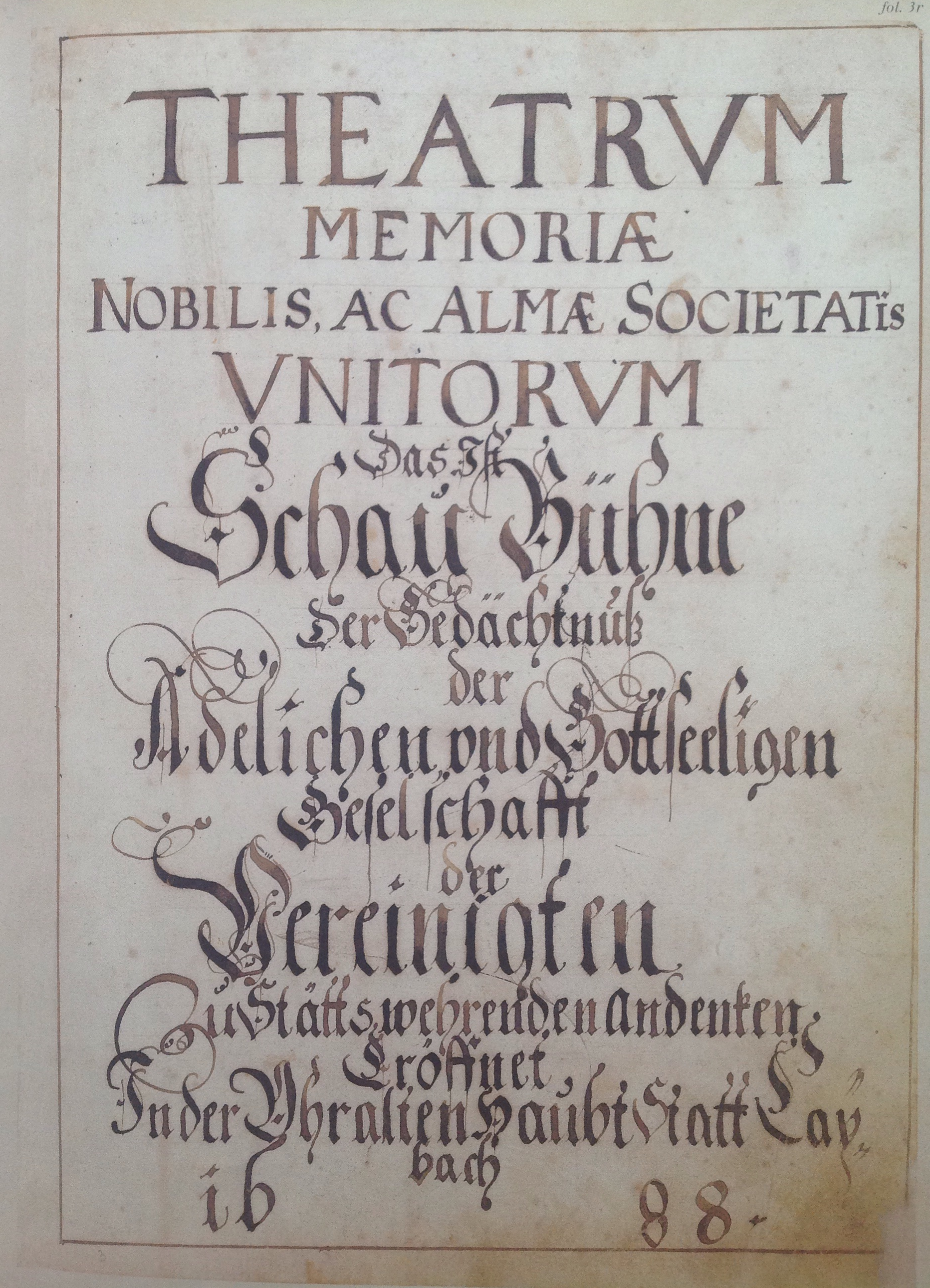 Naslovna stran knjige: Spominska knjiga ljubljanske plemiške družbe sv. Dizma